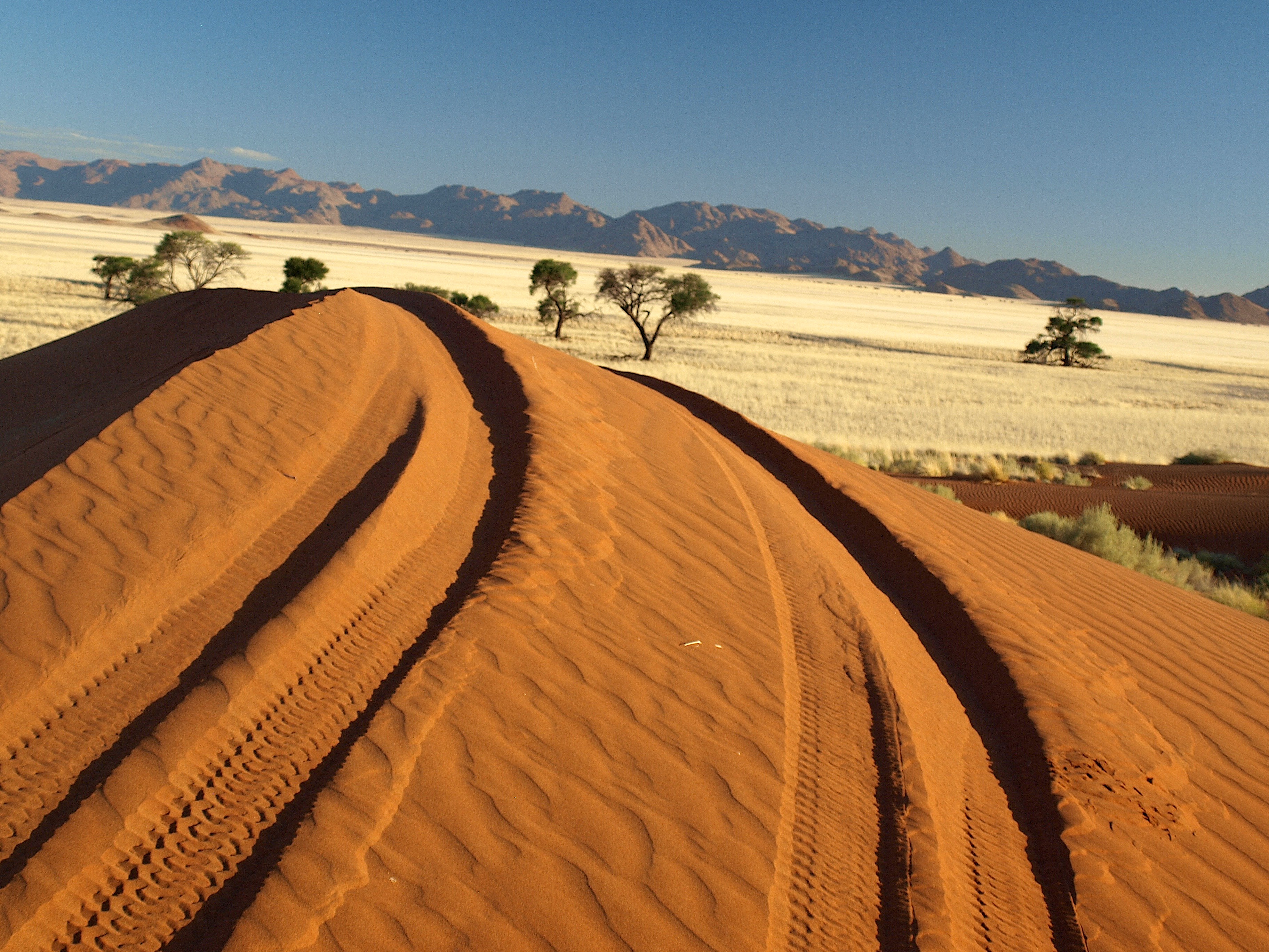 Landrover-Spuren im Sand